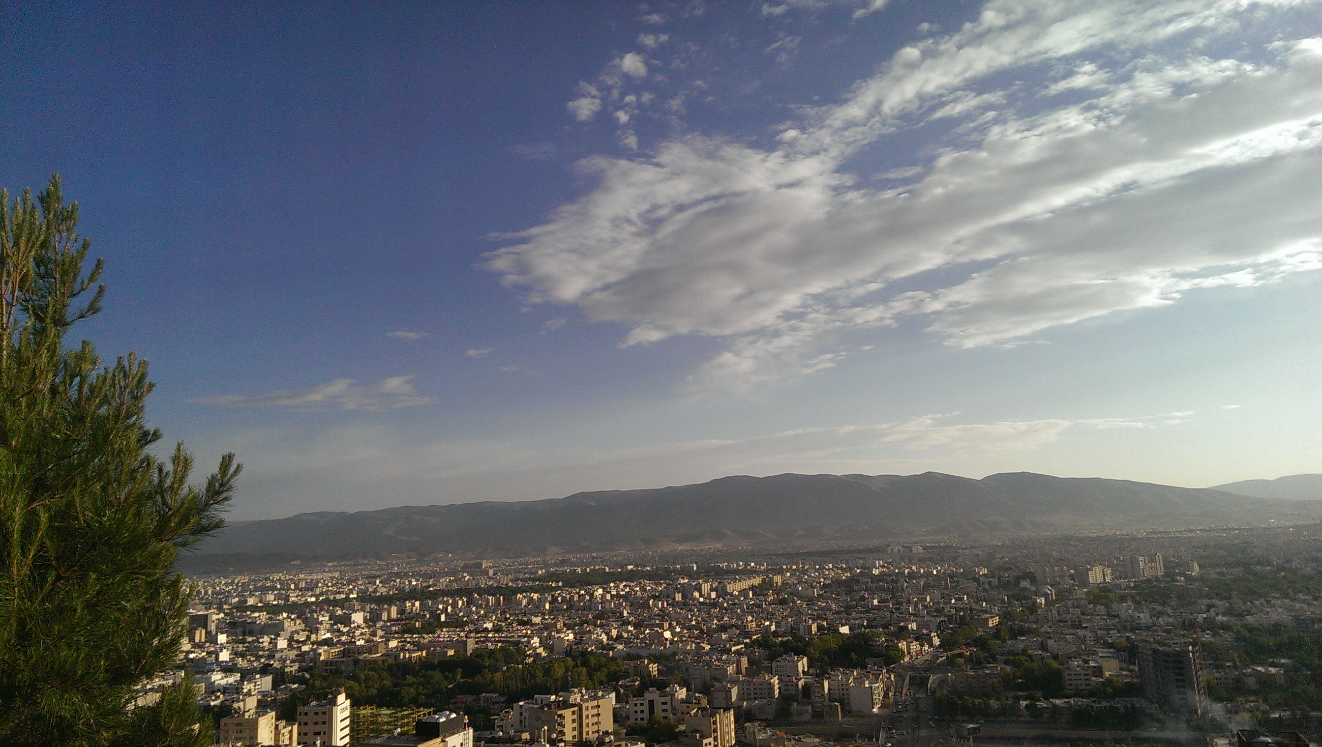 Città di Shiraz, vista dall'alto(Colline di Chamran)